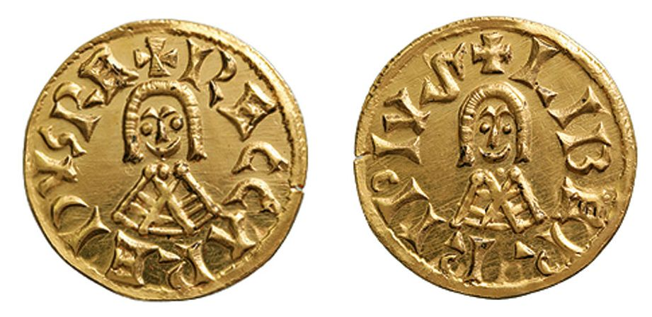 Imitación moderna (¿siglo XX?) de un tremis visigodo de oro acuñado en Iliberri durante el reinado de Recaredo I. Leyendas: anverso "RECAREDVSRE", reverso "LIBERRIPIVS". Fuente: Ruth Pliego, La Moneda Visigoda, 2009, 908. Conservación: EBC+.